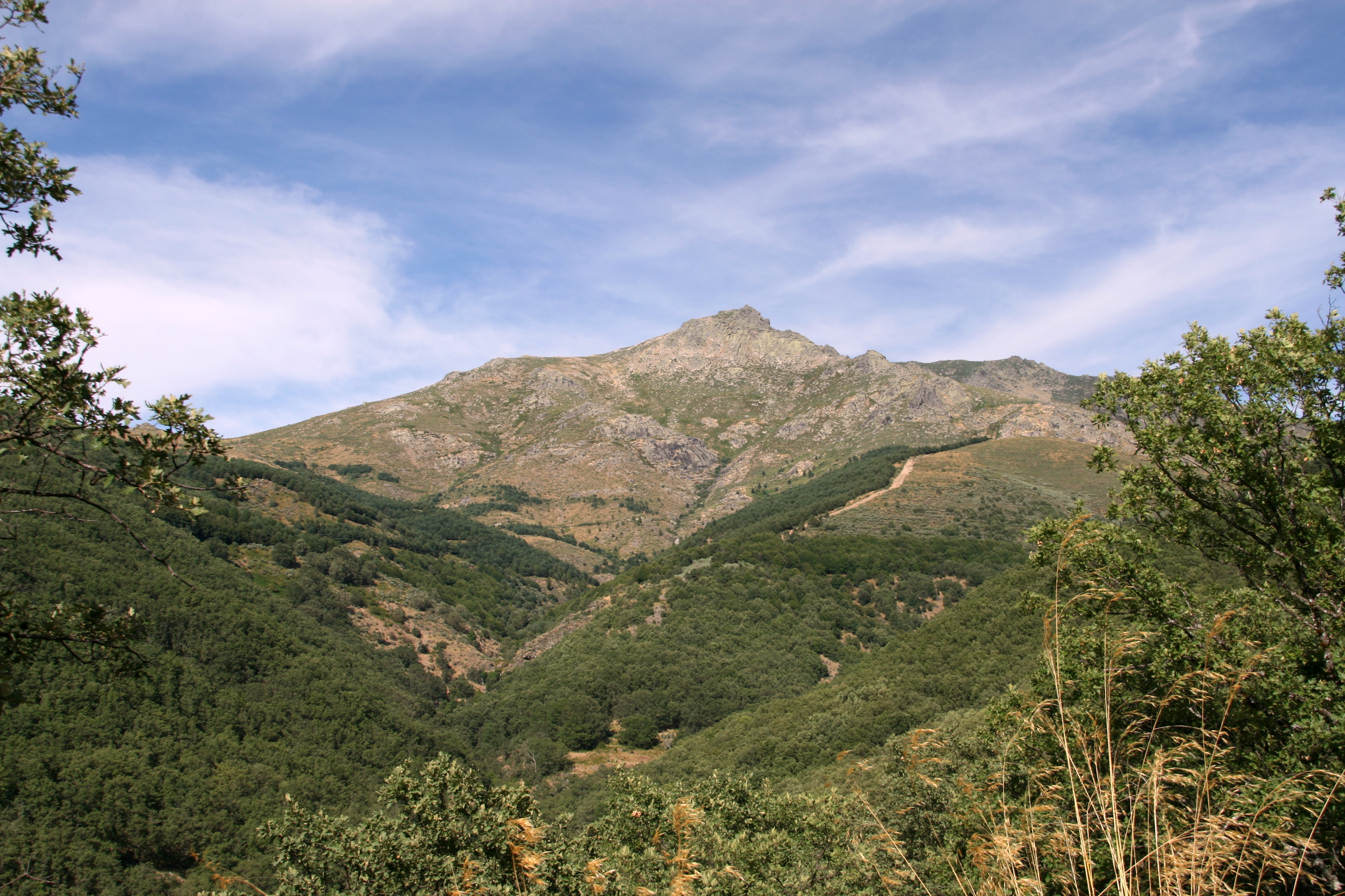 Mole del Canchal Pinajarro, cerrando el valle del Ambroz This is a photography of a Special Area of Conservation in Spain with the ID: ES4320038. Natura2000 entry, EEA entry